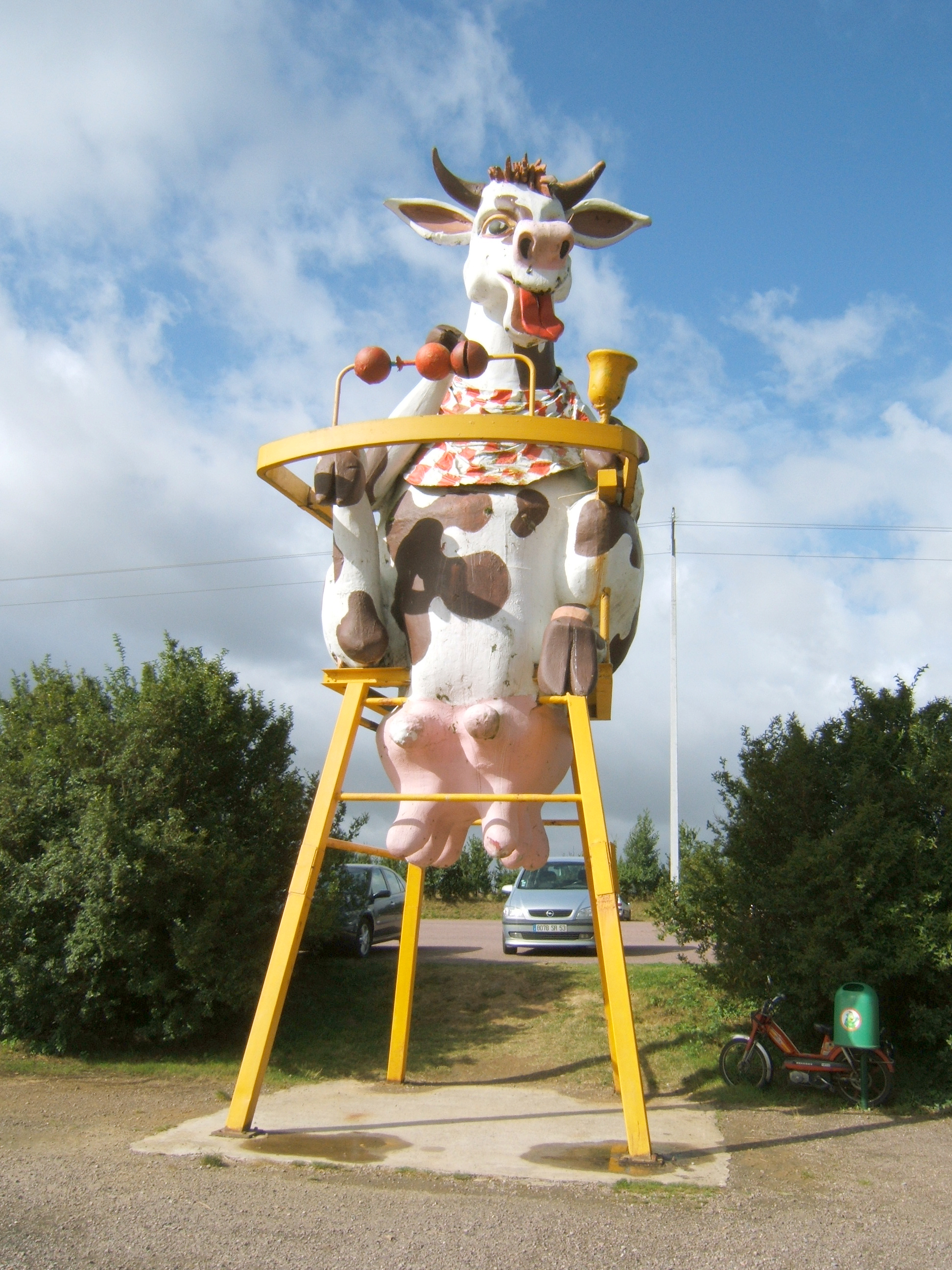 La vache géante assise dans sa chaise haute de bébé, sur le parking du parc d'attraction Festyland à Bretteville-sur-Odon dans le Calvados.